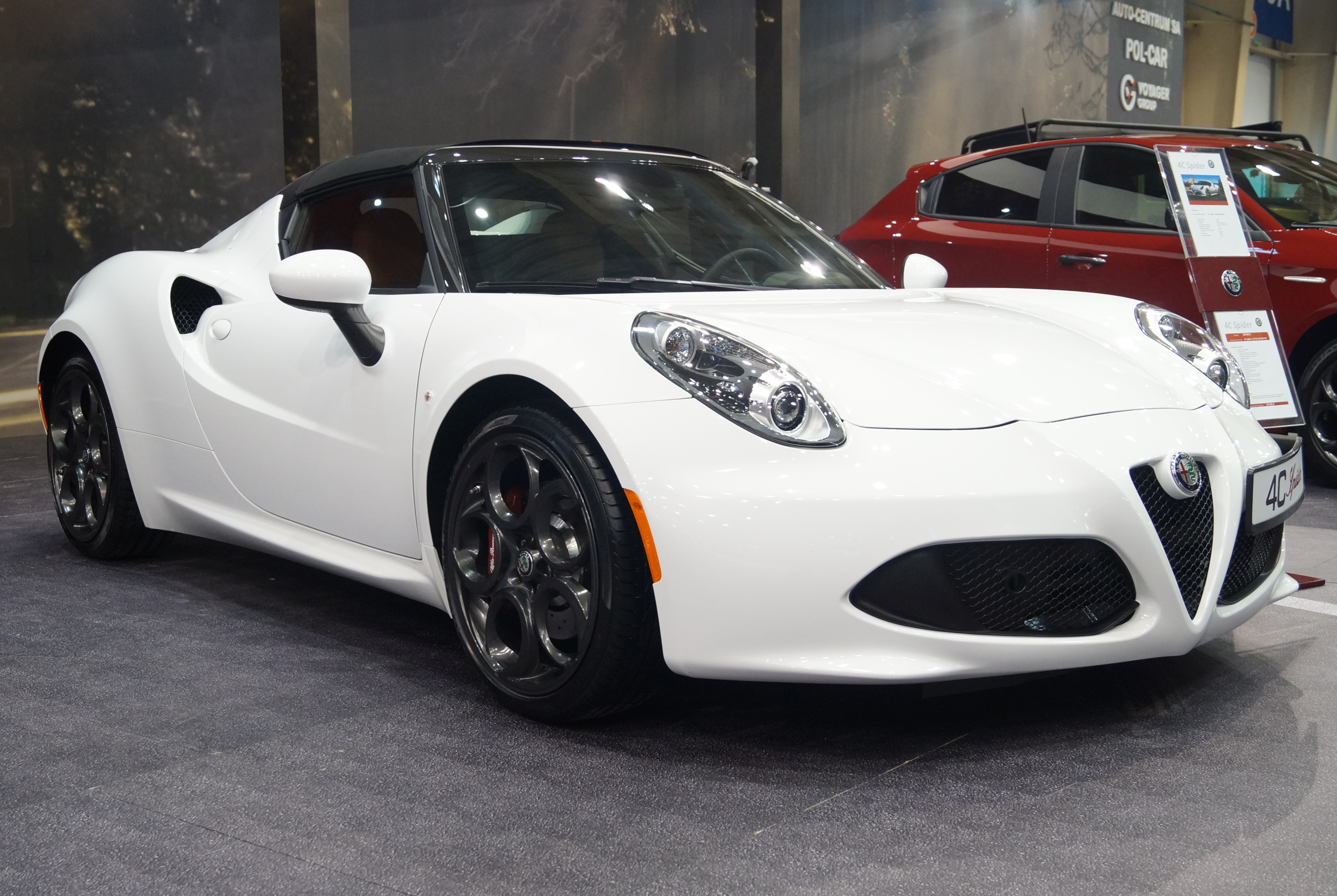 Alfa Romeo 4C Spider na Motor Show Poznań 2017.